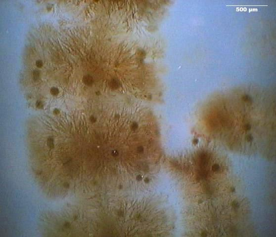 Froschlaichalge